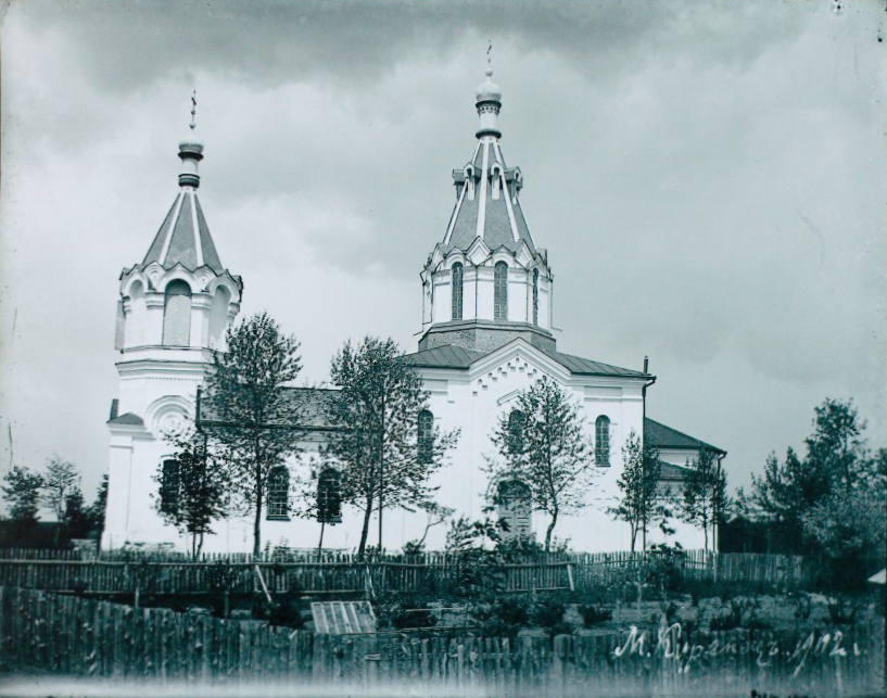 Беларуская (тарашкевіца): Куранец (Kuraniec). Царква-мураўёўка